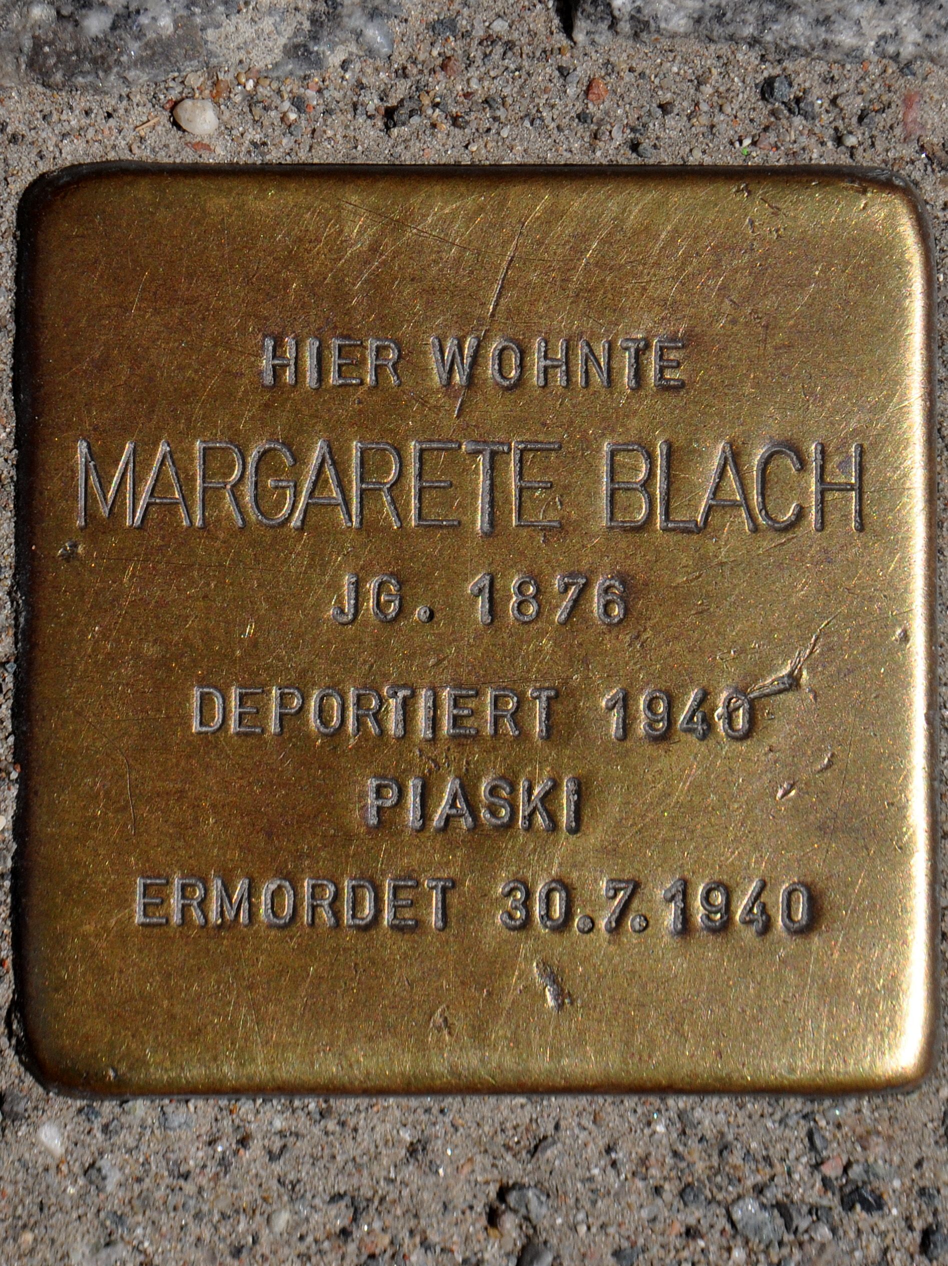 Stolperstein in Stralsund, Ossenreyerstraße HIER WOHNTE MARGARETE BLACH JG. 1876 DEPORTIERT 1940 PIASKI ERMORDET 30.7.1940